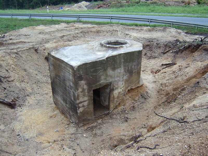 Ringstand Typ 56C (Tobruk) des Westwalls bei Elmpt